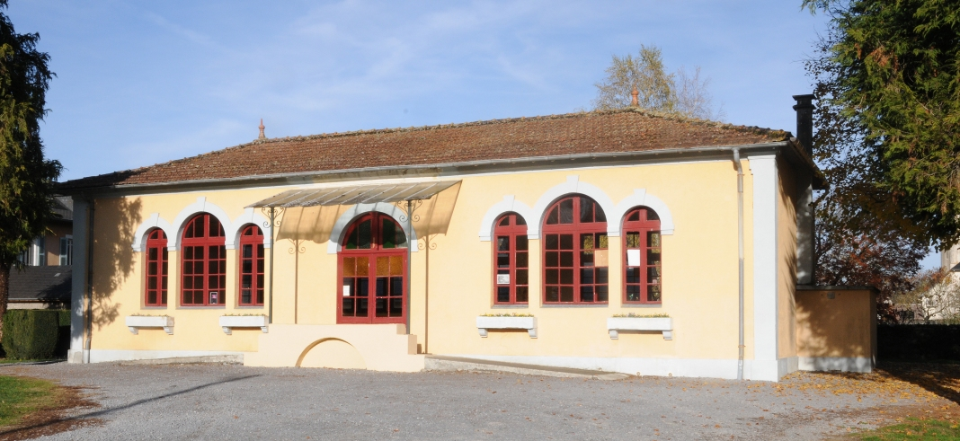 Salle communale d'Assat (64510).